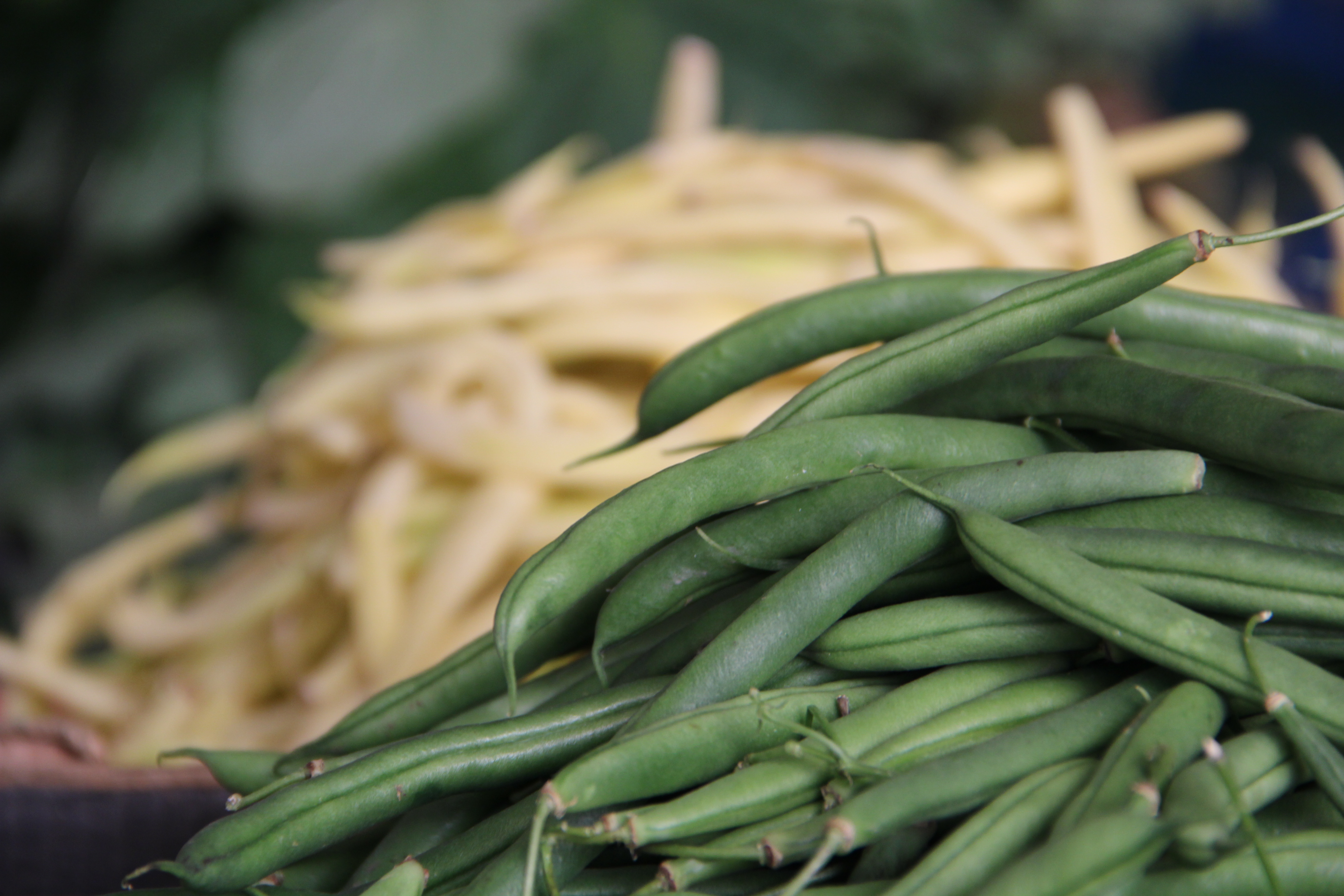 שעועית מצויה (ירוקה וצהובה) טרייה מיד לאחר הקטיפה מוצעת למחירה התמונה נלקחה בשוק נצרת בינואר 2017 .